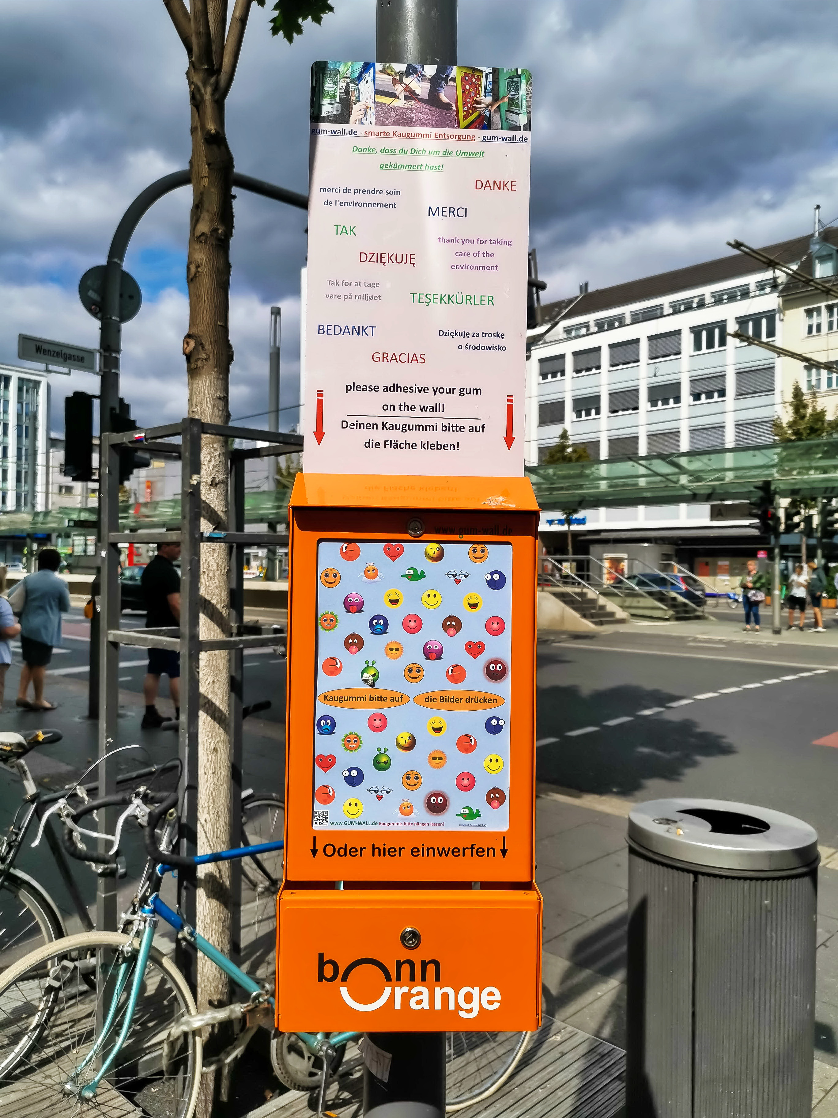 Gum Wall am Bertha-von-Suttner-Platz in Bonn; An der Stelle, wo die Wenzelgasse in den Platz einmündet, testet Bonnorange ein neues Verfahren, um Kaugummis umweltfreundlich und nachhaltig zu entsorgen.[1]